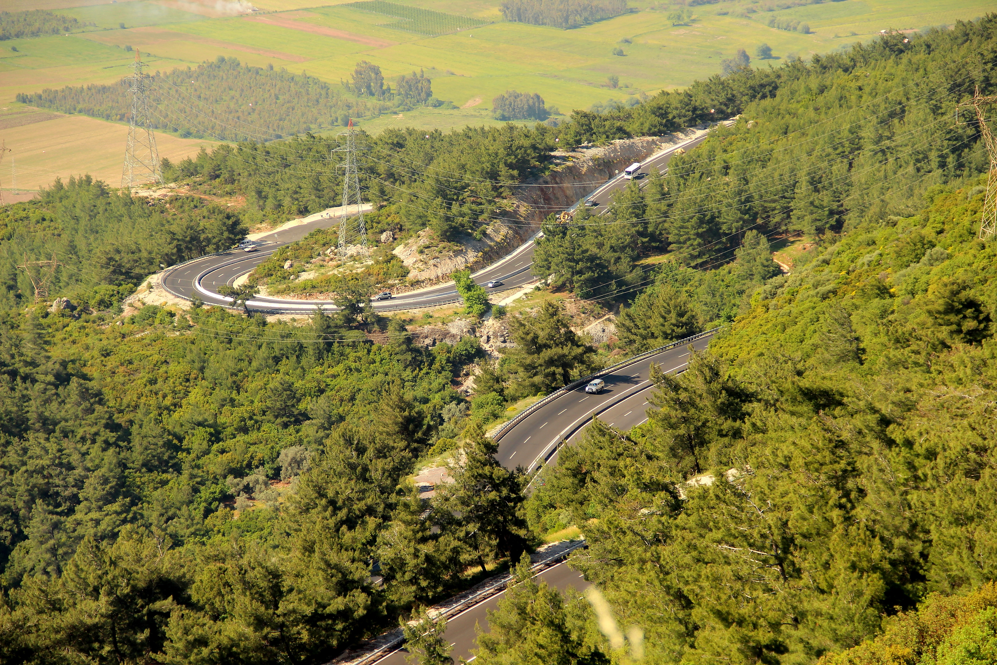 Gökova Yolu